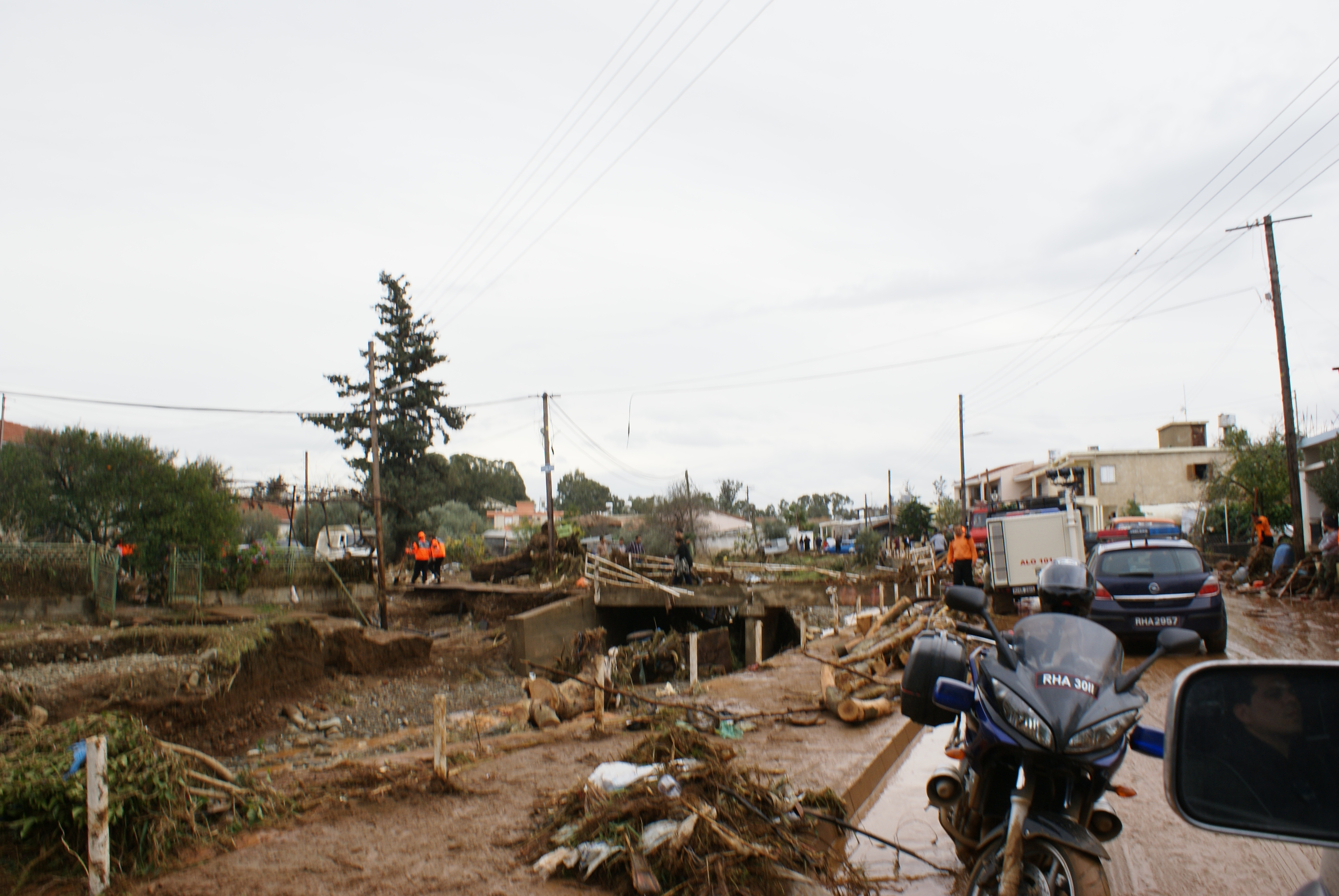 2010 Güzelyurt selinin ardından Bostancı köyü. Köy, en fazla hasar gören yerlerdendi. Görüntüdeki dere taşmış ve köprü harap olmuştu.